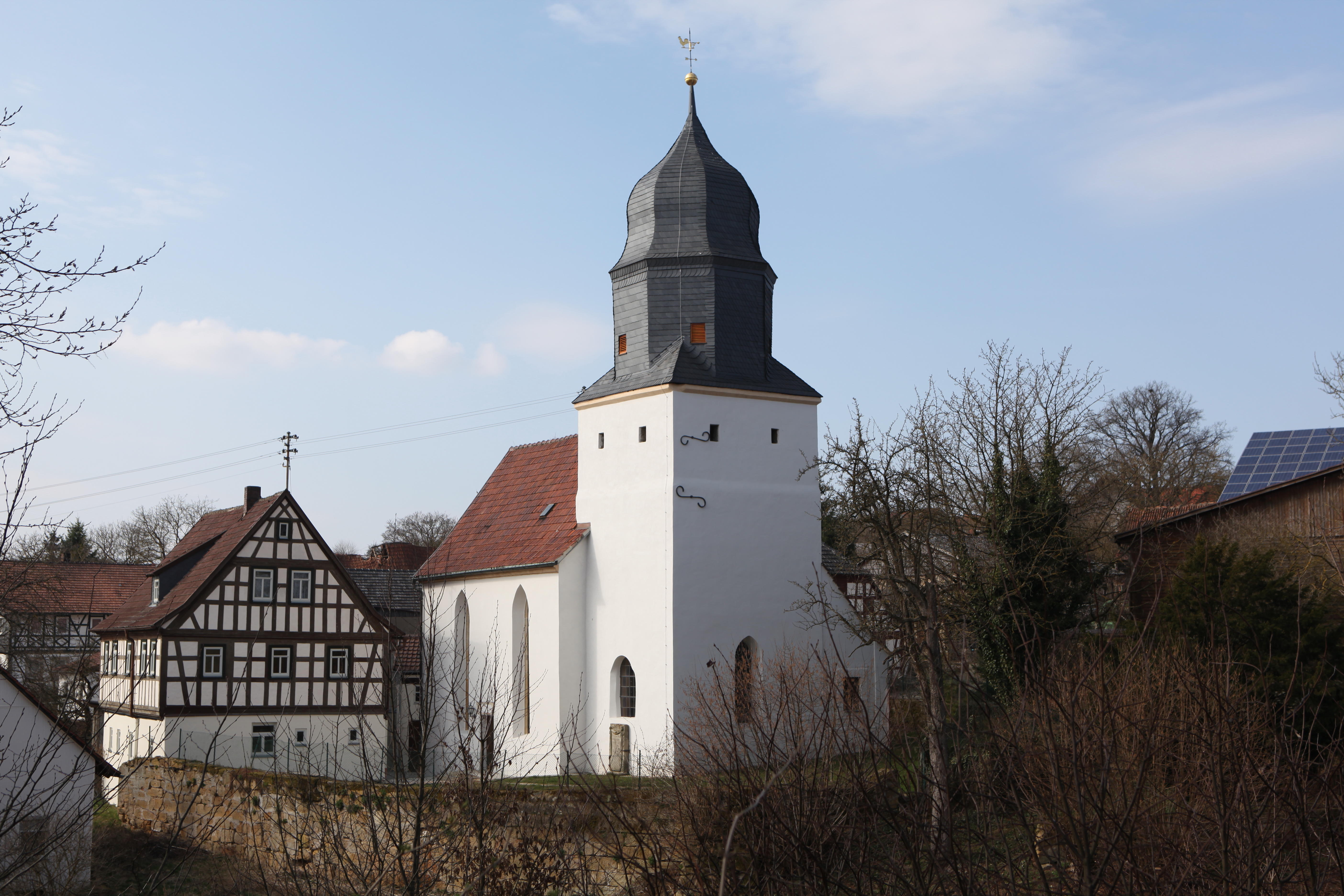 Evangelische Jakobuskirche in Herreth, Landkreis Coburg